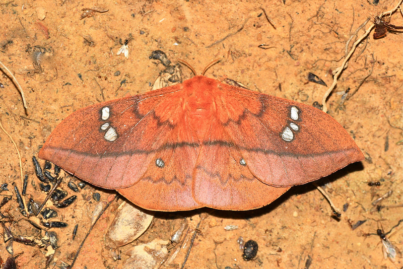 Cricula trifenestrata, female. Borneo, Trusmadi area.